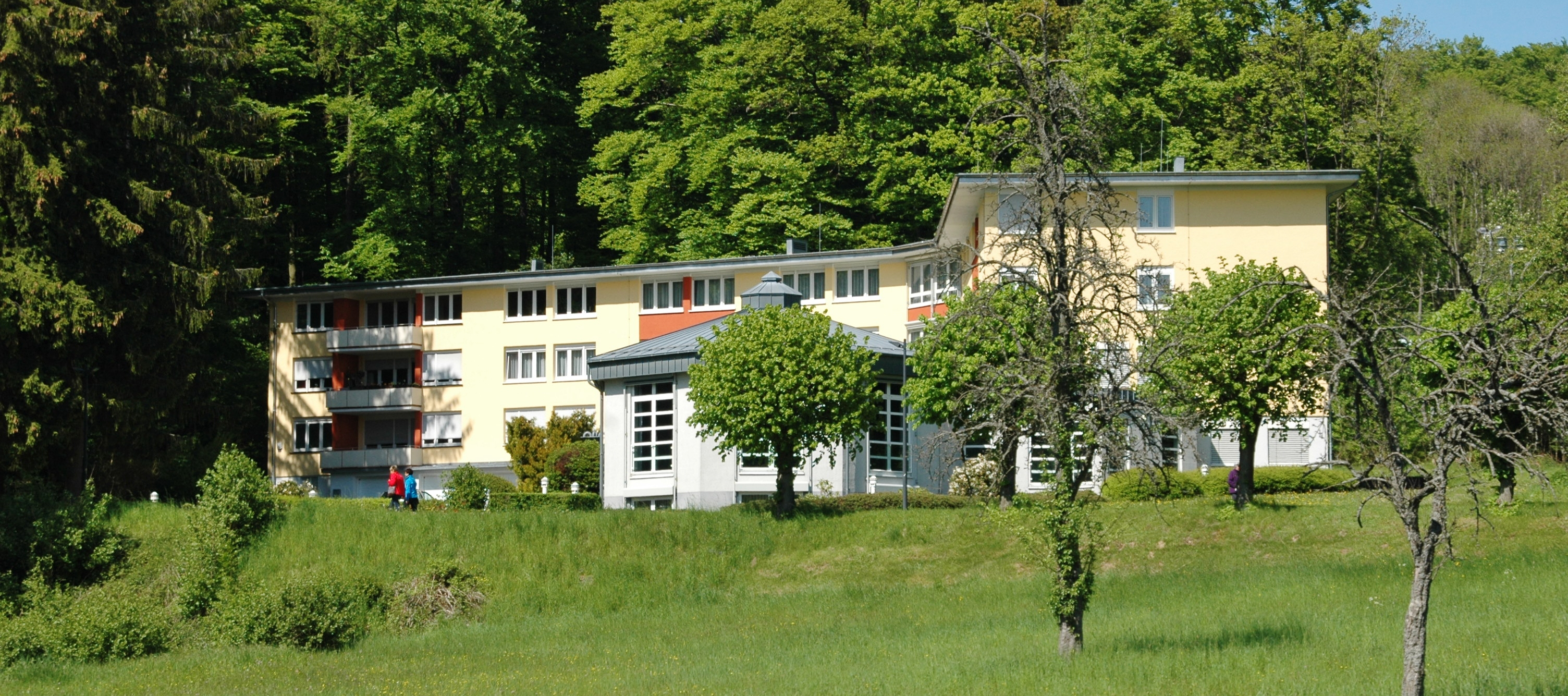 Eleonoren-Klinik in Lindenfels